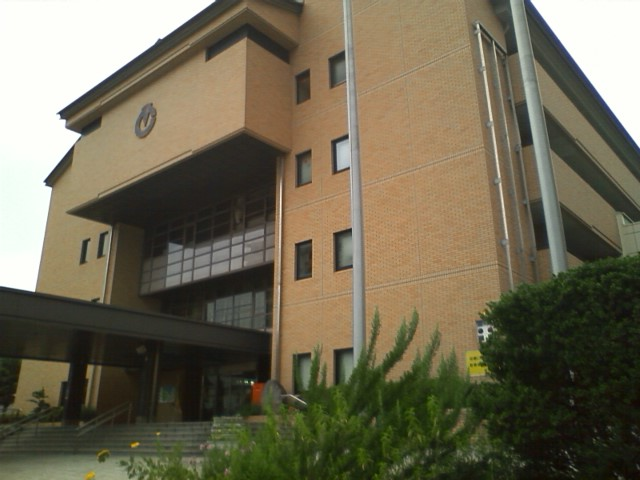 時津町役場 第１庁舎の写真。 第２庁舎もある。